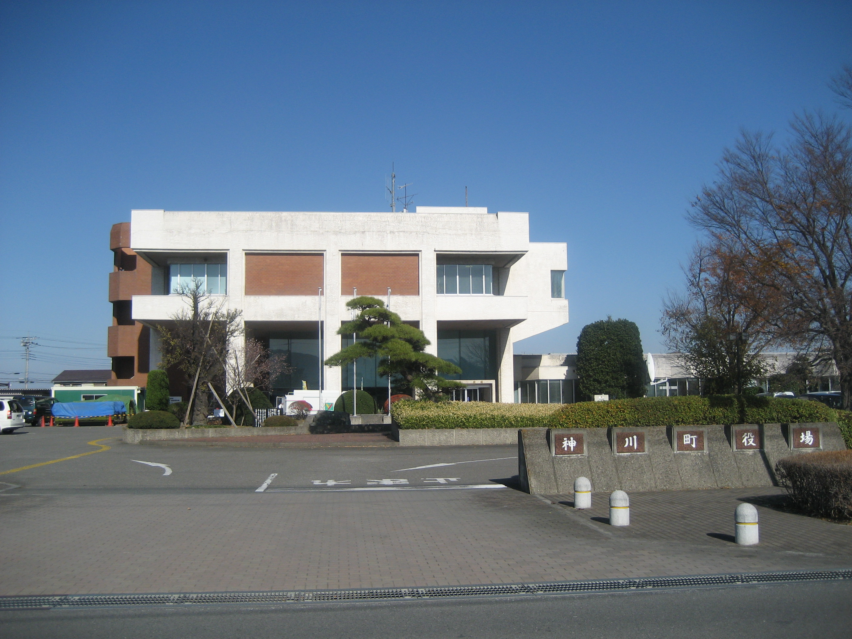 埼玉県神川町役場庁舎